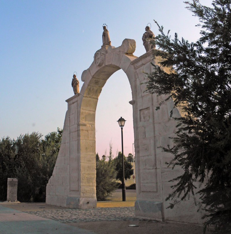 Arco de los Santos de Piedra